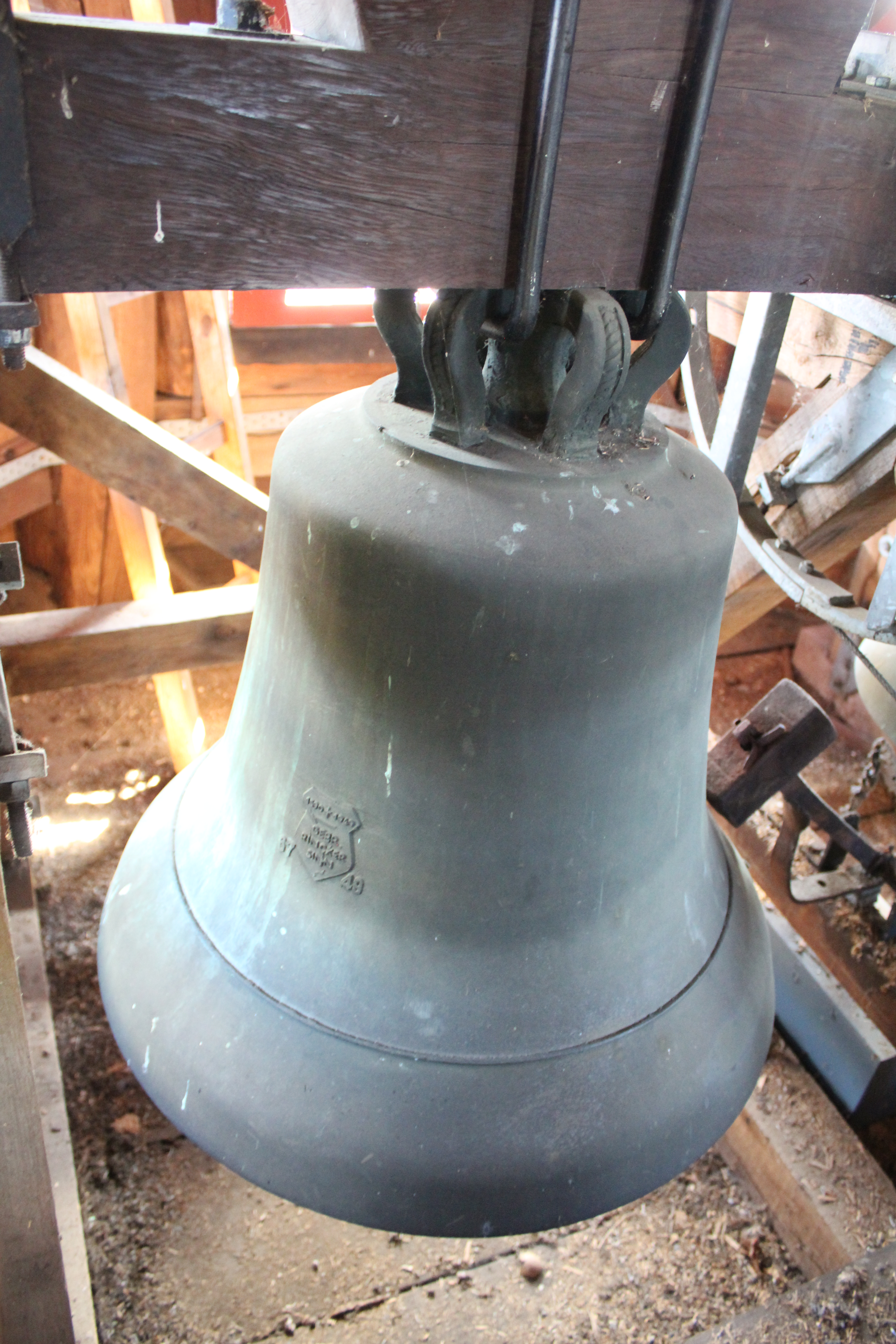 Evangelische Kirche Wallernhausen, Nidda, Wetteraukreis, Hessen, Deutschland